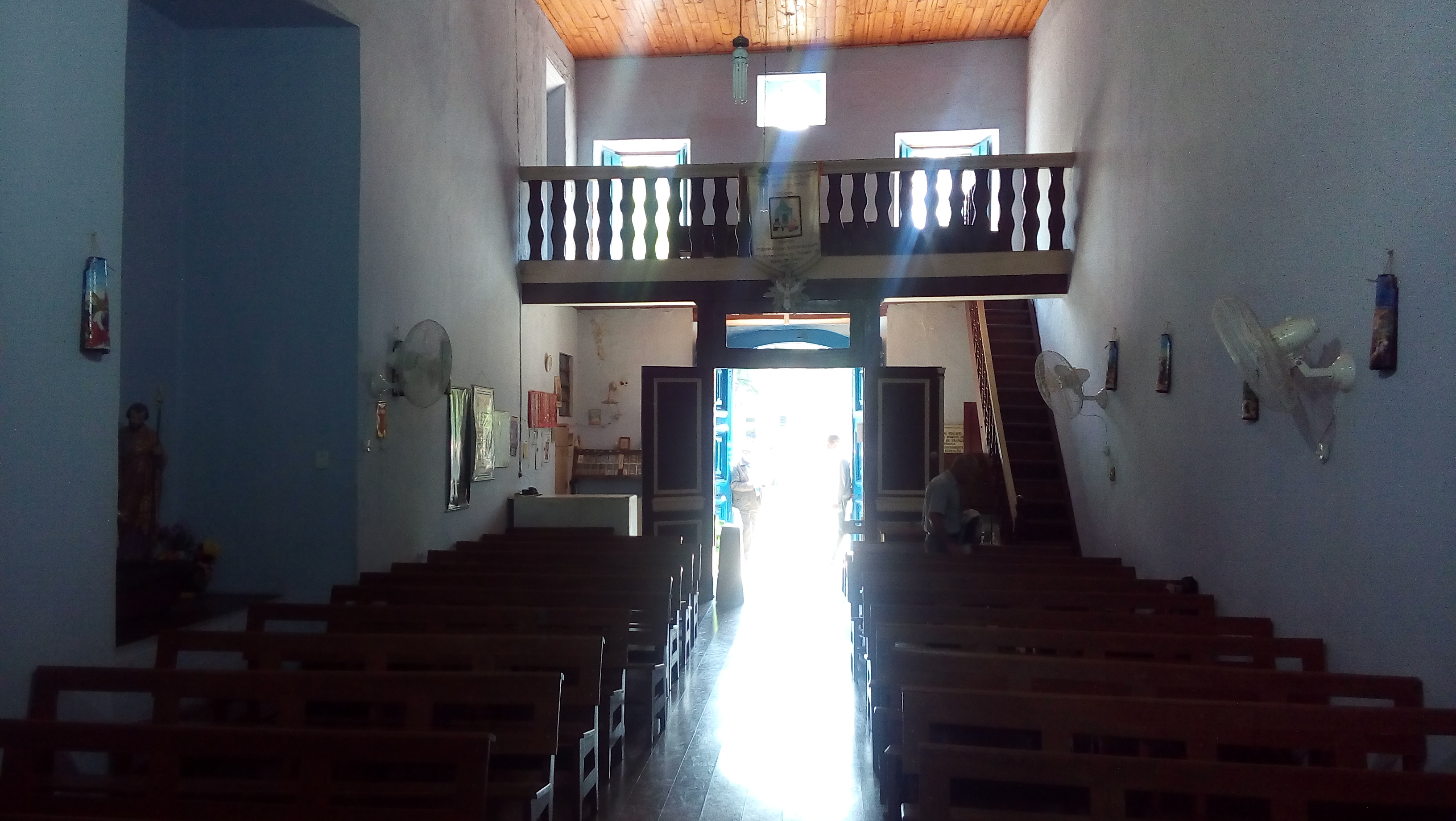 Interior da Igreja do Rosário dos Homens Pretos da Penha, em São Paulo (SP), Brasil